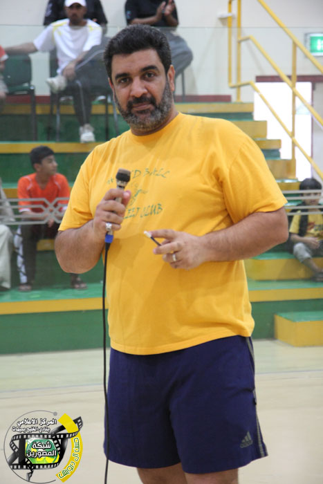 الكابتن عباس السبع في أحد المشاركات في أحدى دورات البراعم 01